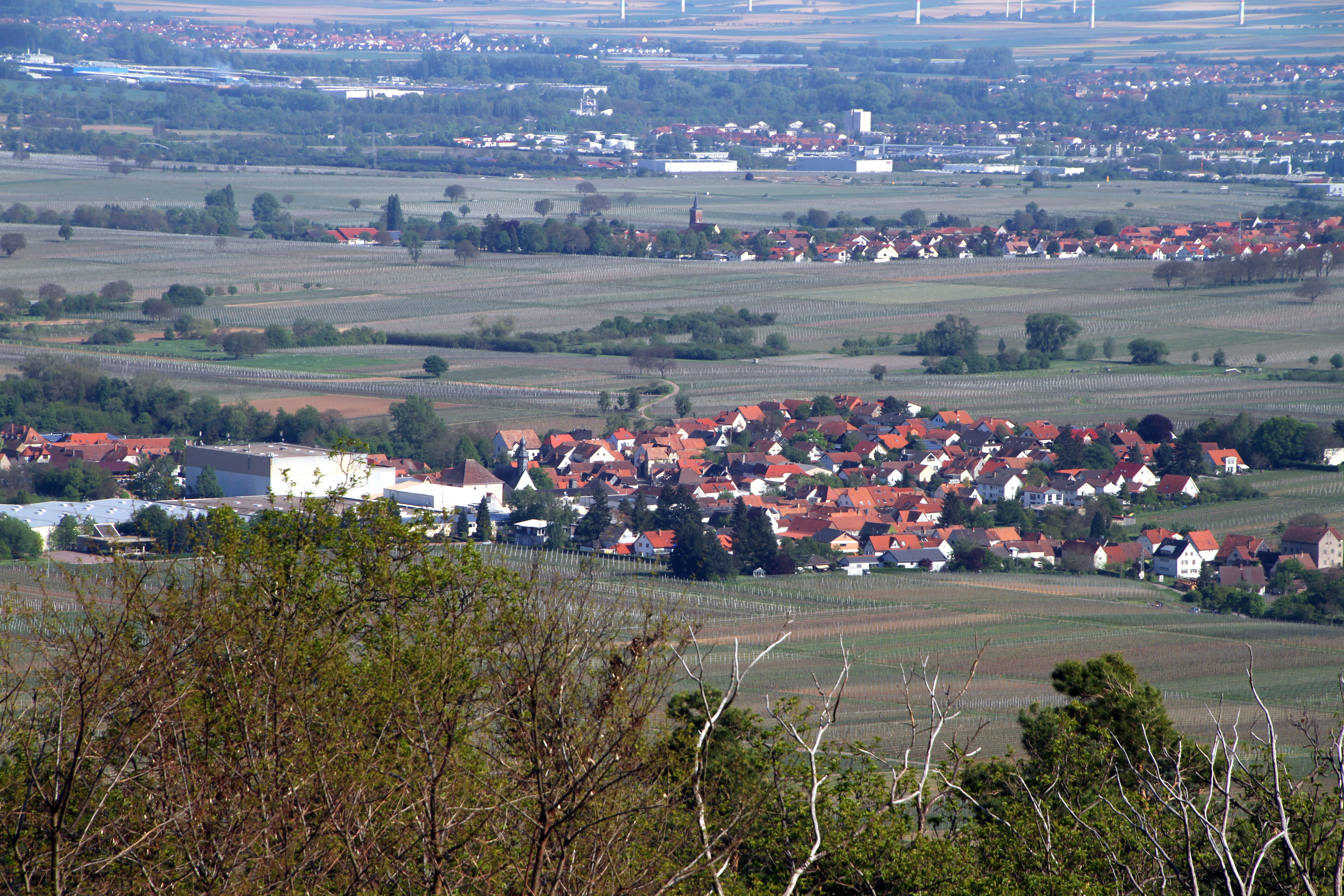 Aussicht von St.-Anna-Kapelle (Burrweiler)